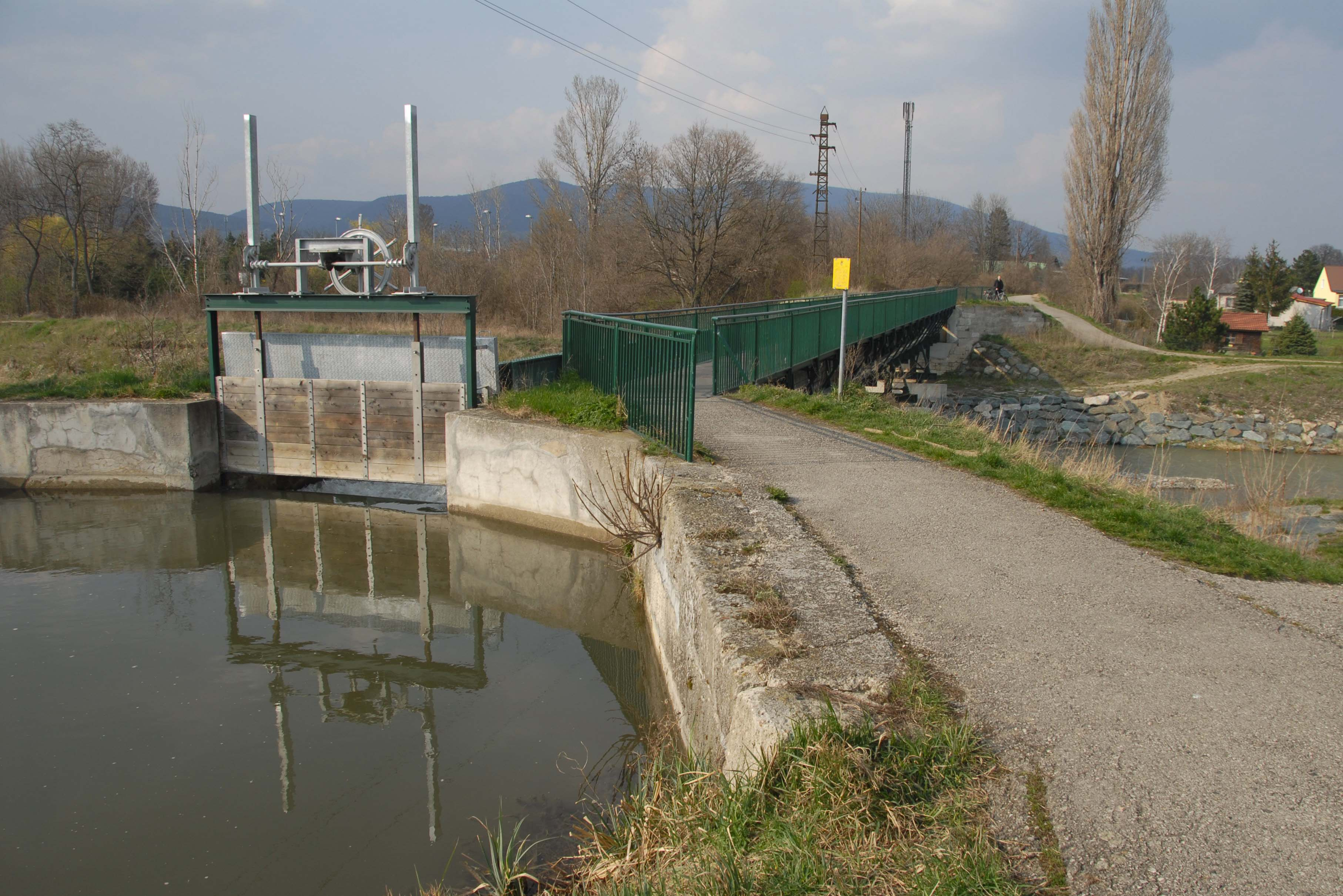 Das Aquädukt des Wiener Neustädter Kanals über die Schwechat in Tribuswinkel bei Baden. Der Schieber dient zur Ableitung des Wassers in die Schwechat.